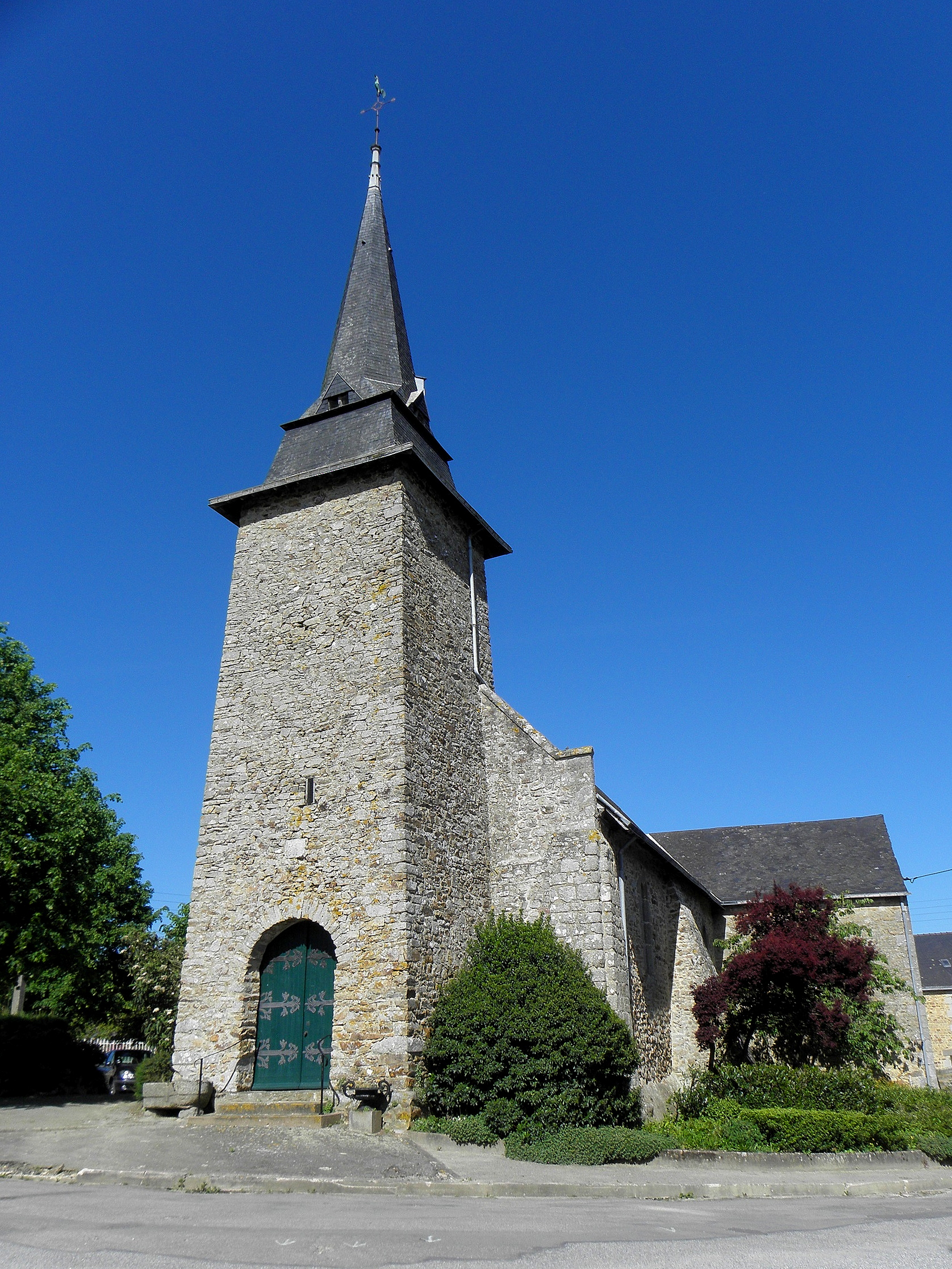 Église Saint-Martin de La Bigottière (53).